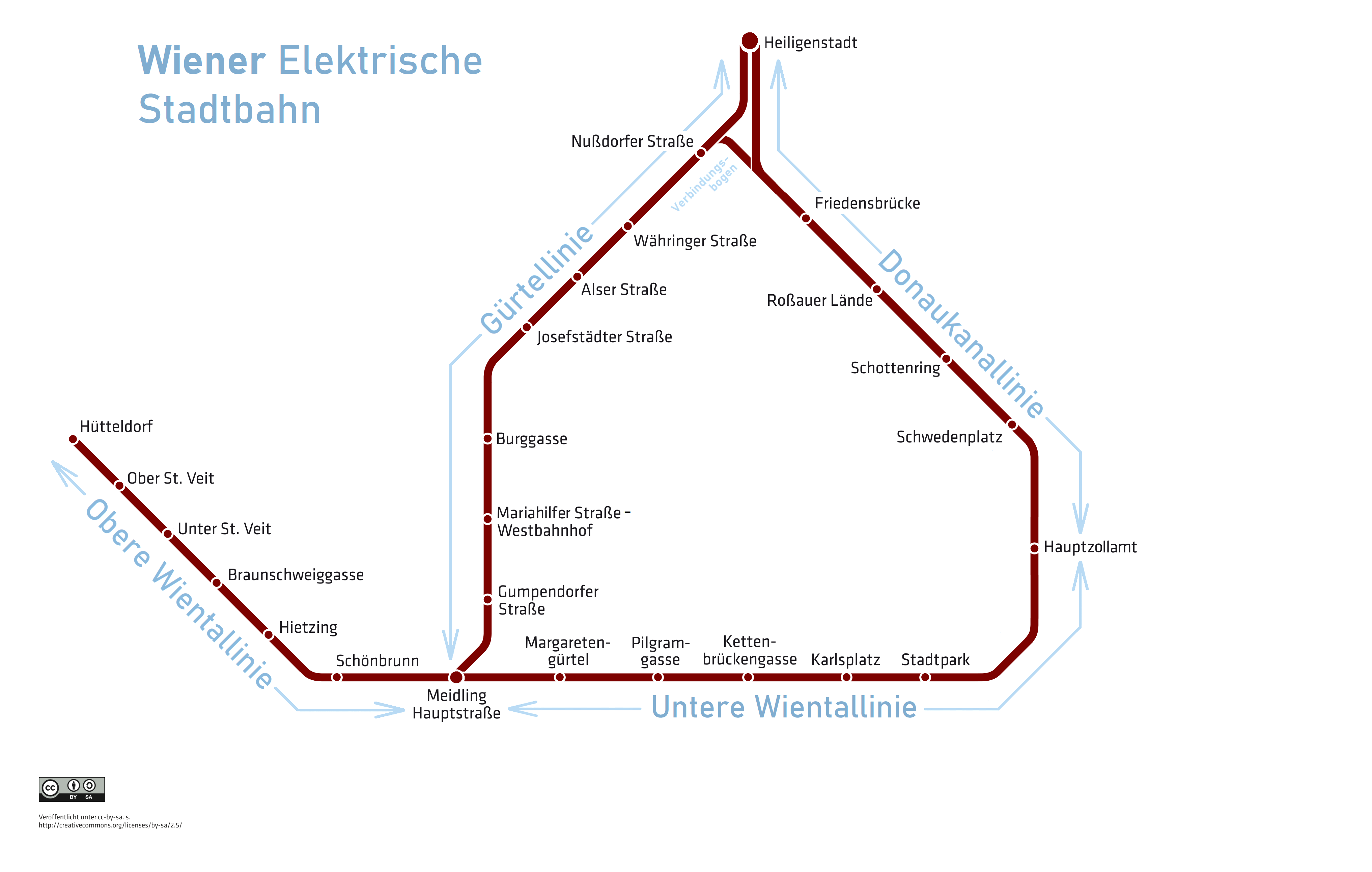 Diese Karte zeigt das Netz der Wiener Elektrischen Stadtbahn vor dem Beginn der 1. Ausbaustufe der U-Bahn